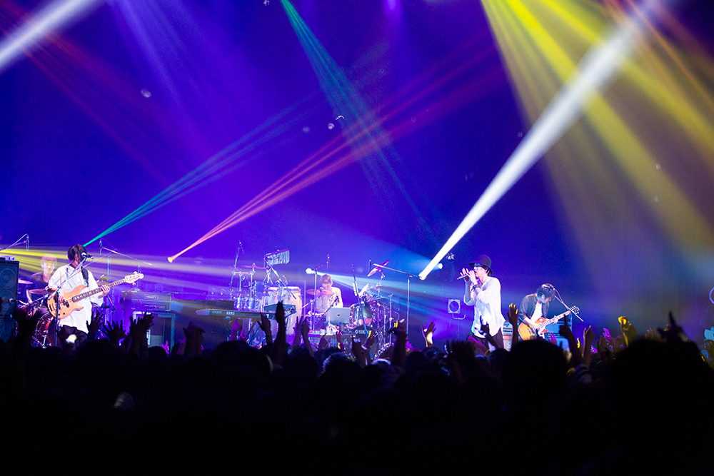 RADWIMPS。2016年撮影。